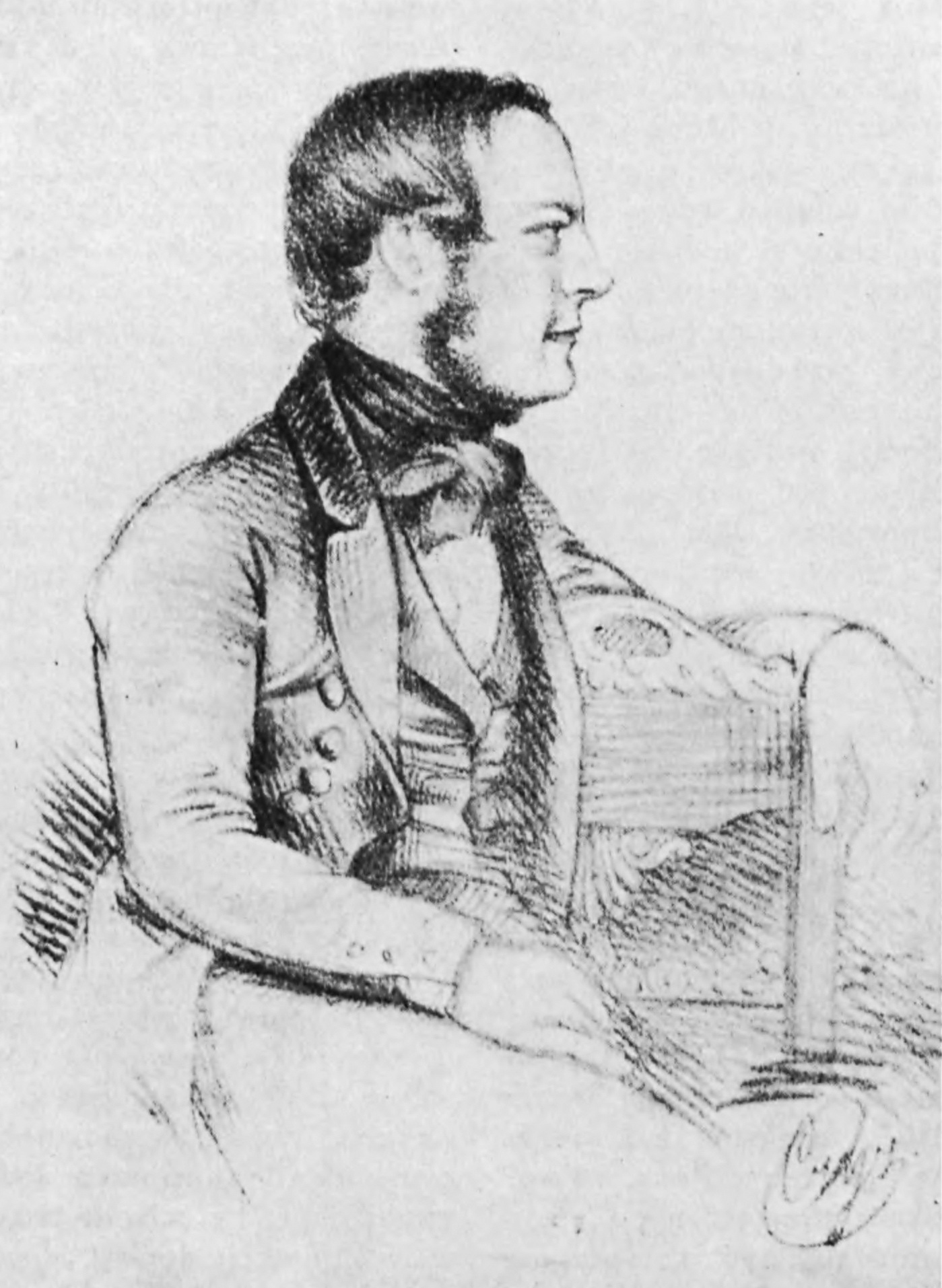 Stanisław Moniuszko w pierwszych latach wileńskich